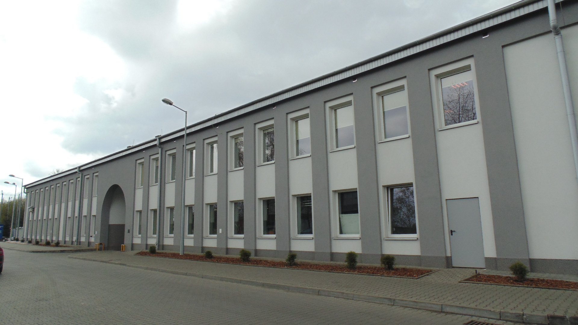 Budynek Administracyjny ZMT